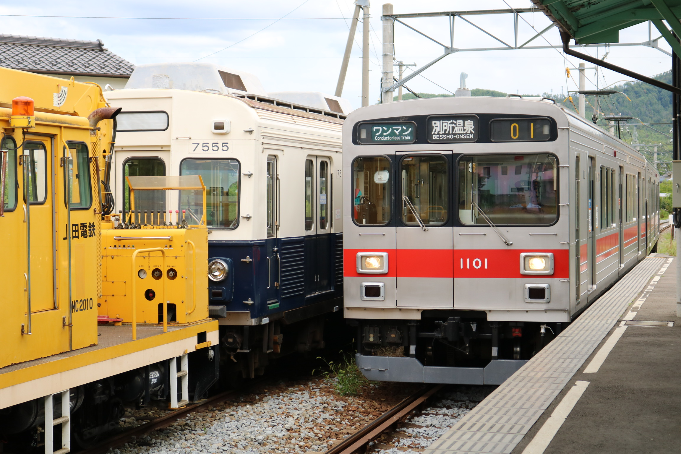 7255編成が陸送の為に中塩田駅に留置されていた僅かな期間のみ見られた光景